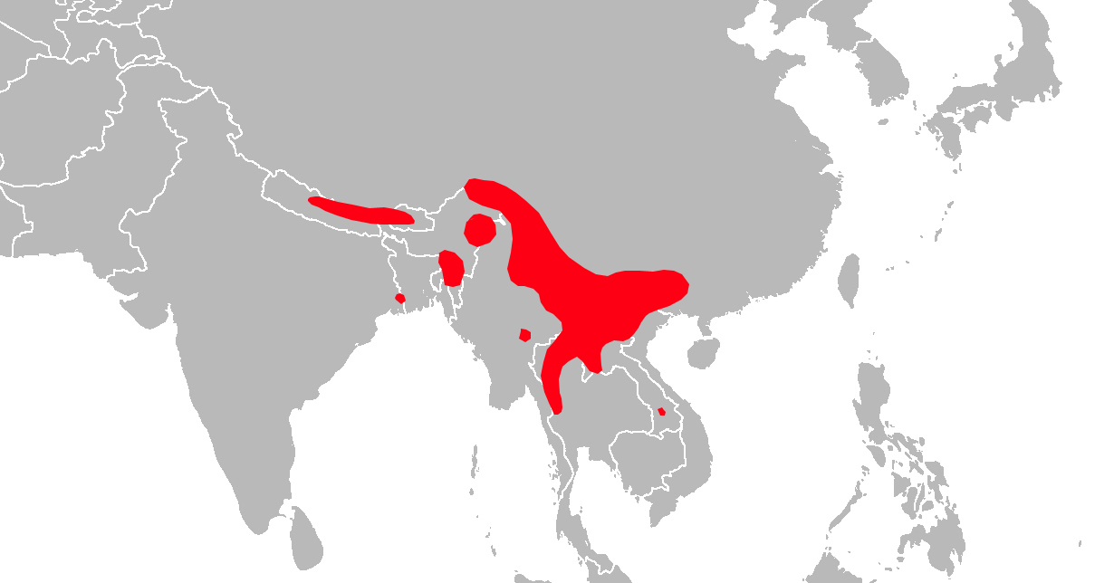 Carte de répartition du macaque d'Assam, Macaca assamensis. Etablie par Christophe Chauvin.